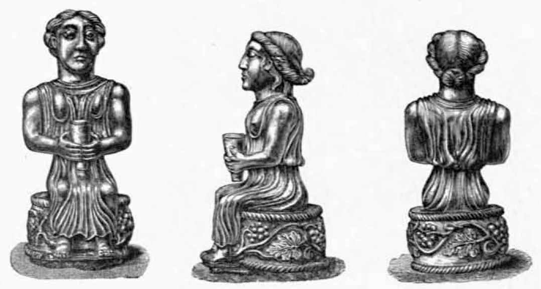 Desen al statuetei aflată în centrul farfuriei Patera, obiect component al Tezaurului de la Pietroasa. Desenul a fost publicat de Alexandru Odobescu în albumul cu anexe conținând imagini ale tezaurului românesc